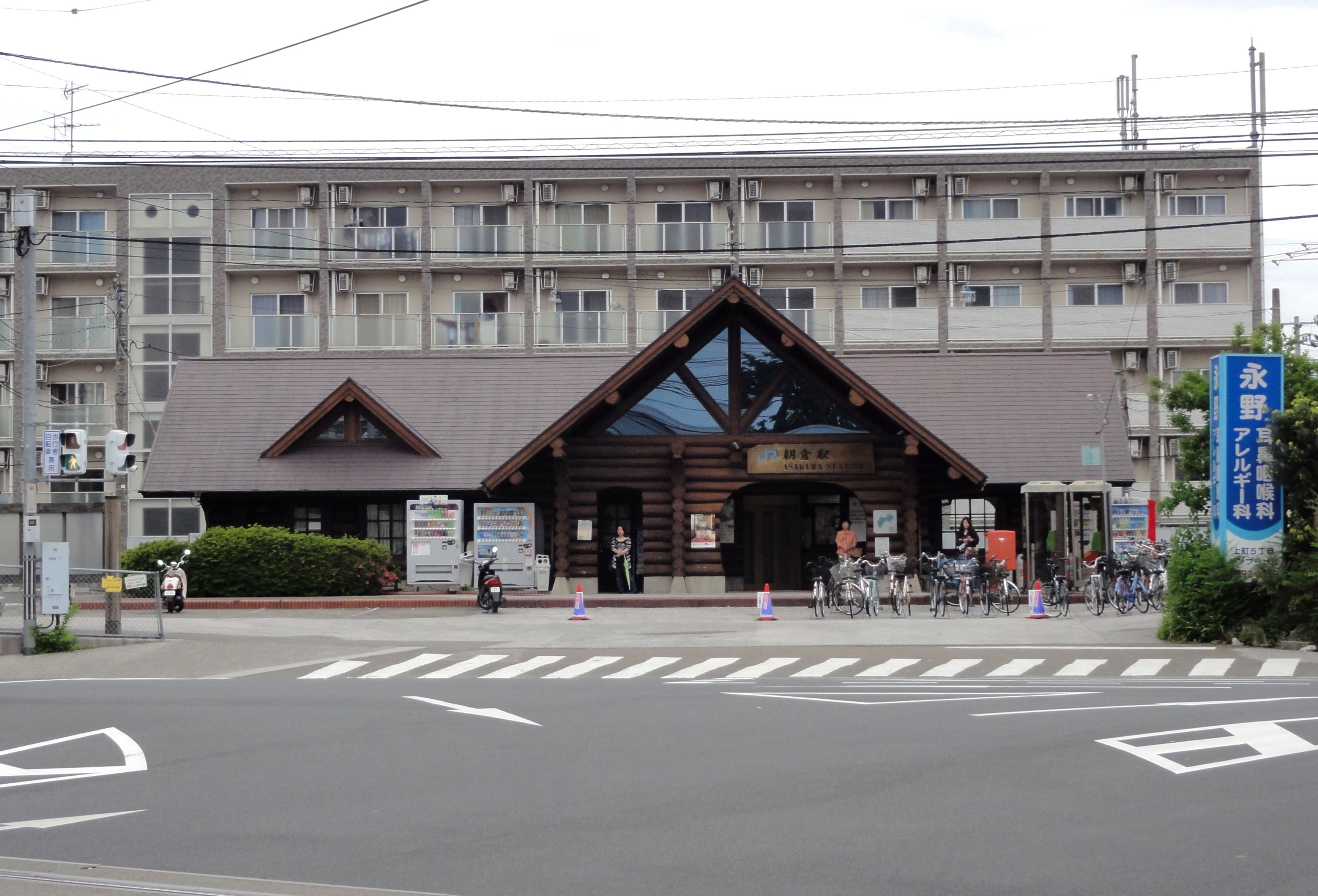 四国旅客鉄道 朝倉駅